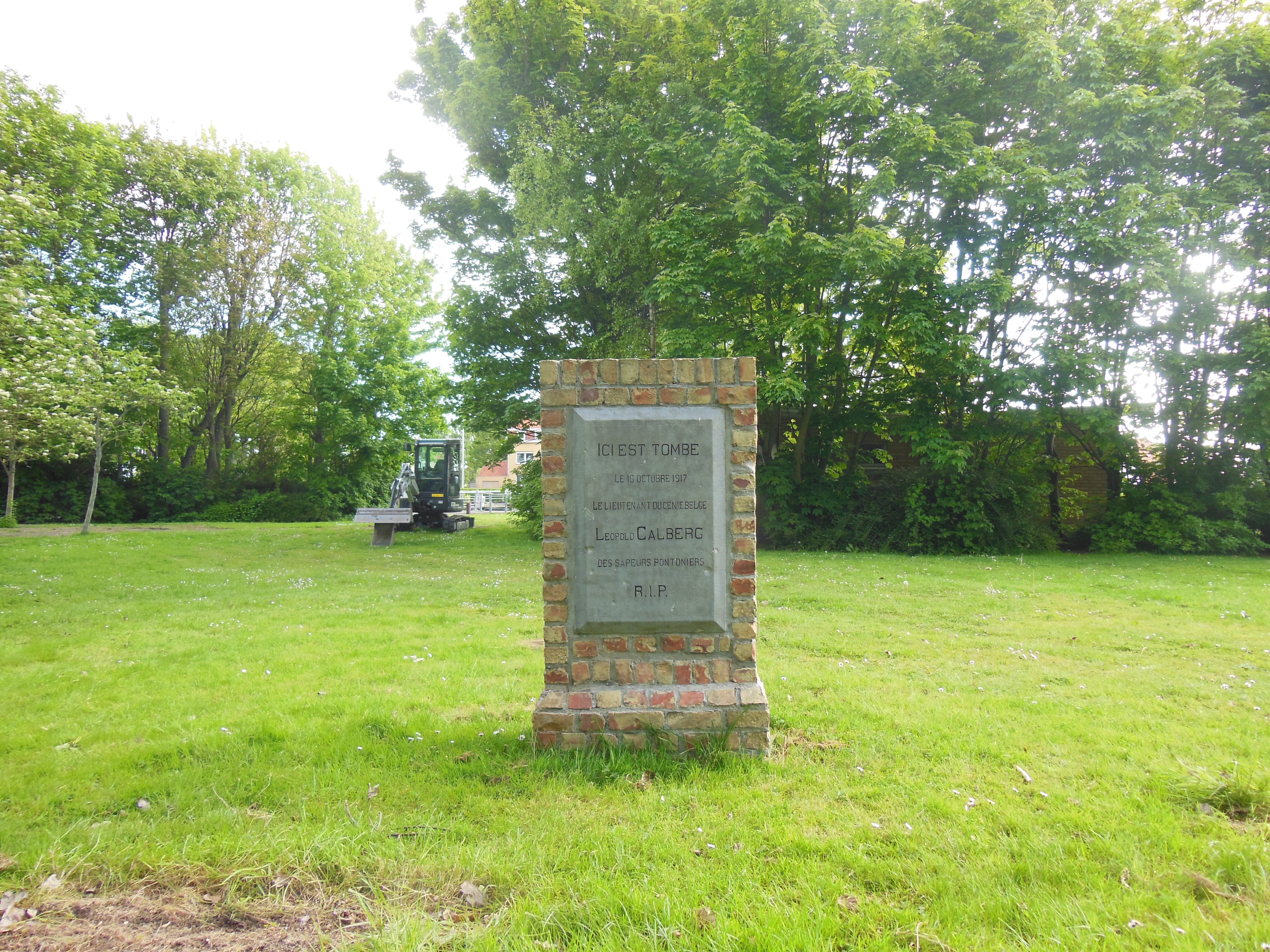 Monumentje ter herinnering aan Luitenant Calberg van de Compagnie Sapeurs-Pontonniers